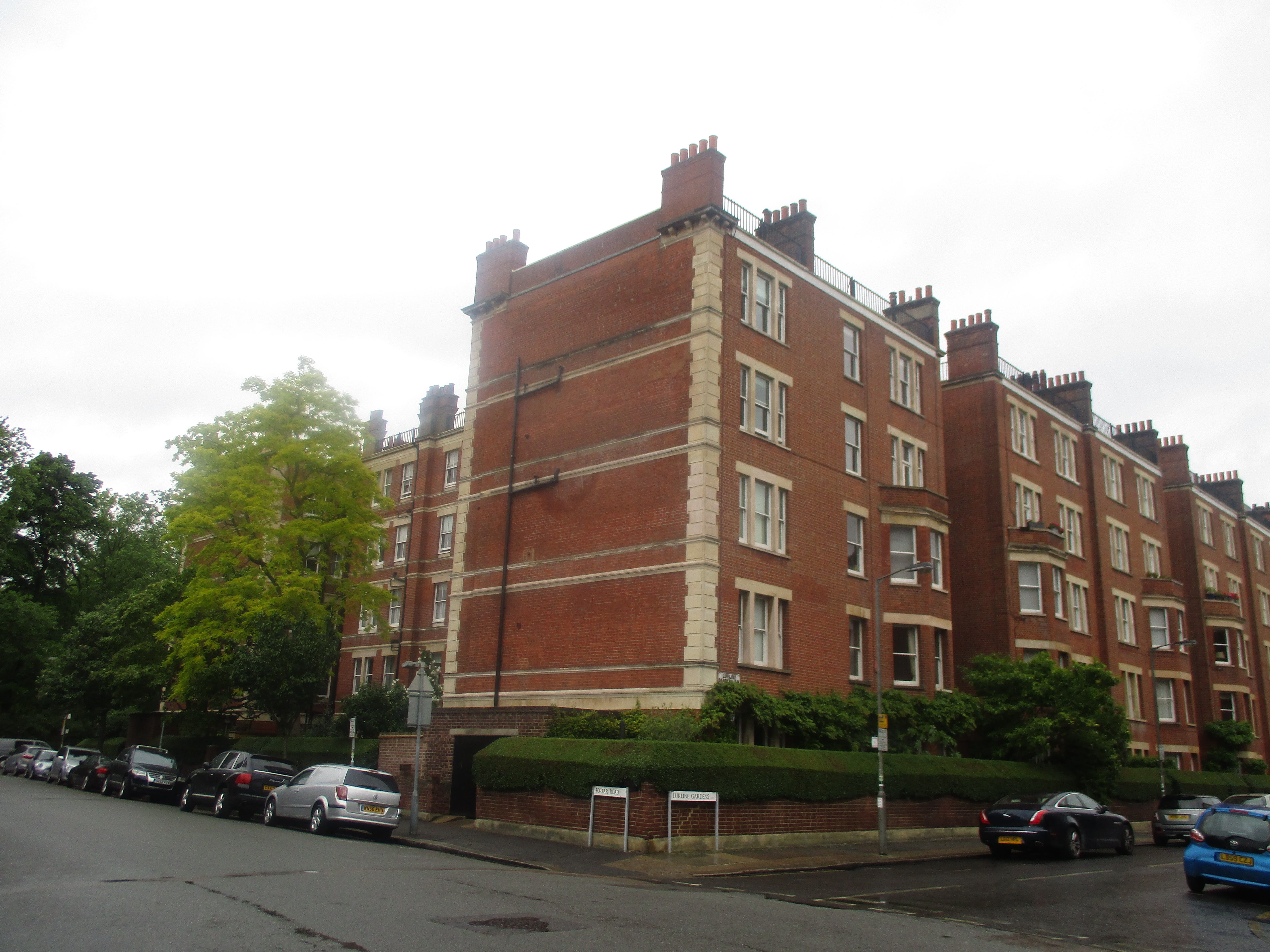 York Mansions, vue arrière donnant sur Lurline Gardens, à l'angle de Forfar Road.